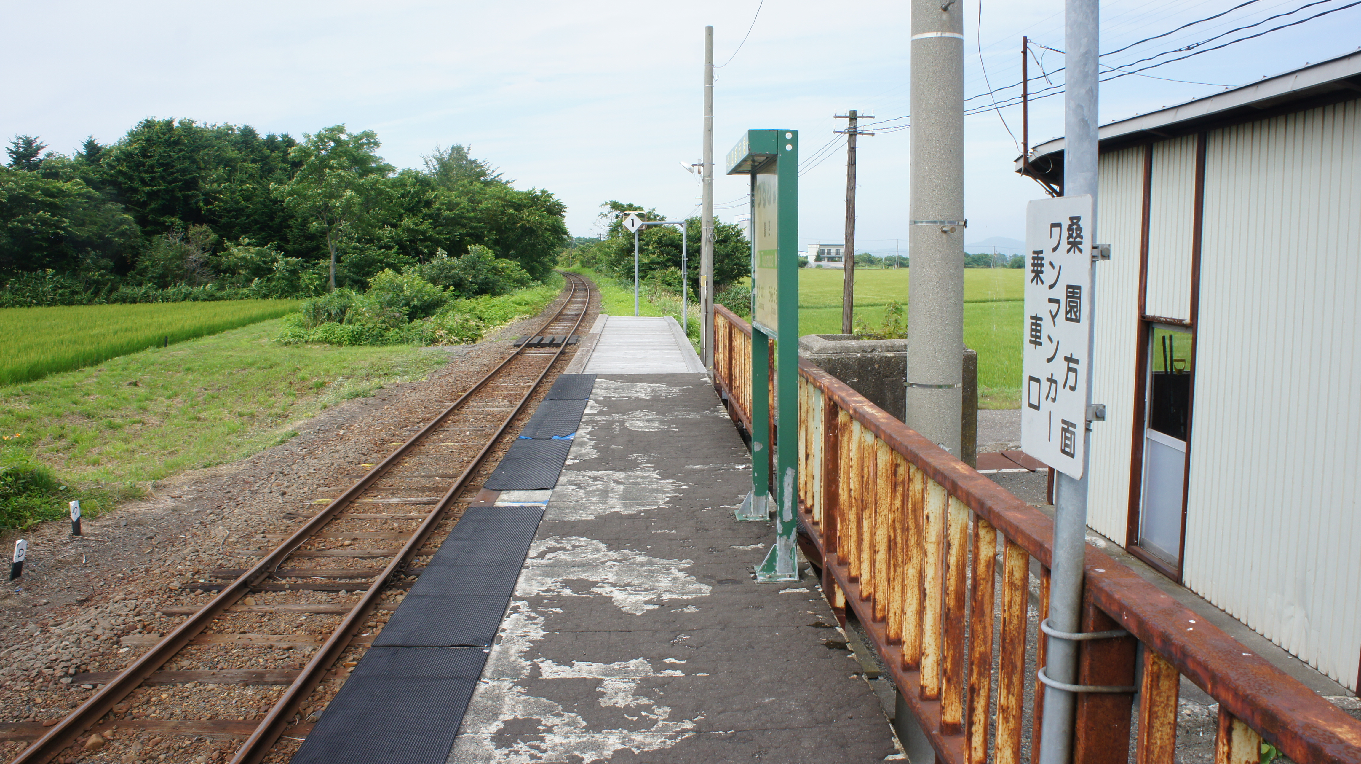 JR札沼線・鶴沼駅のホーム